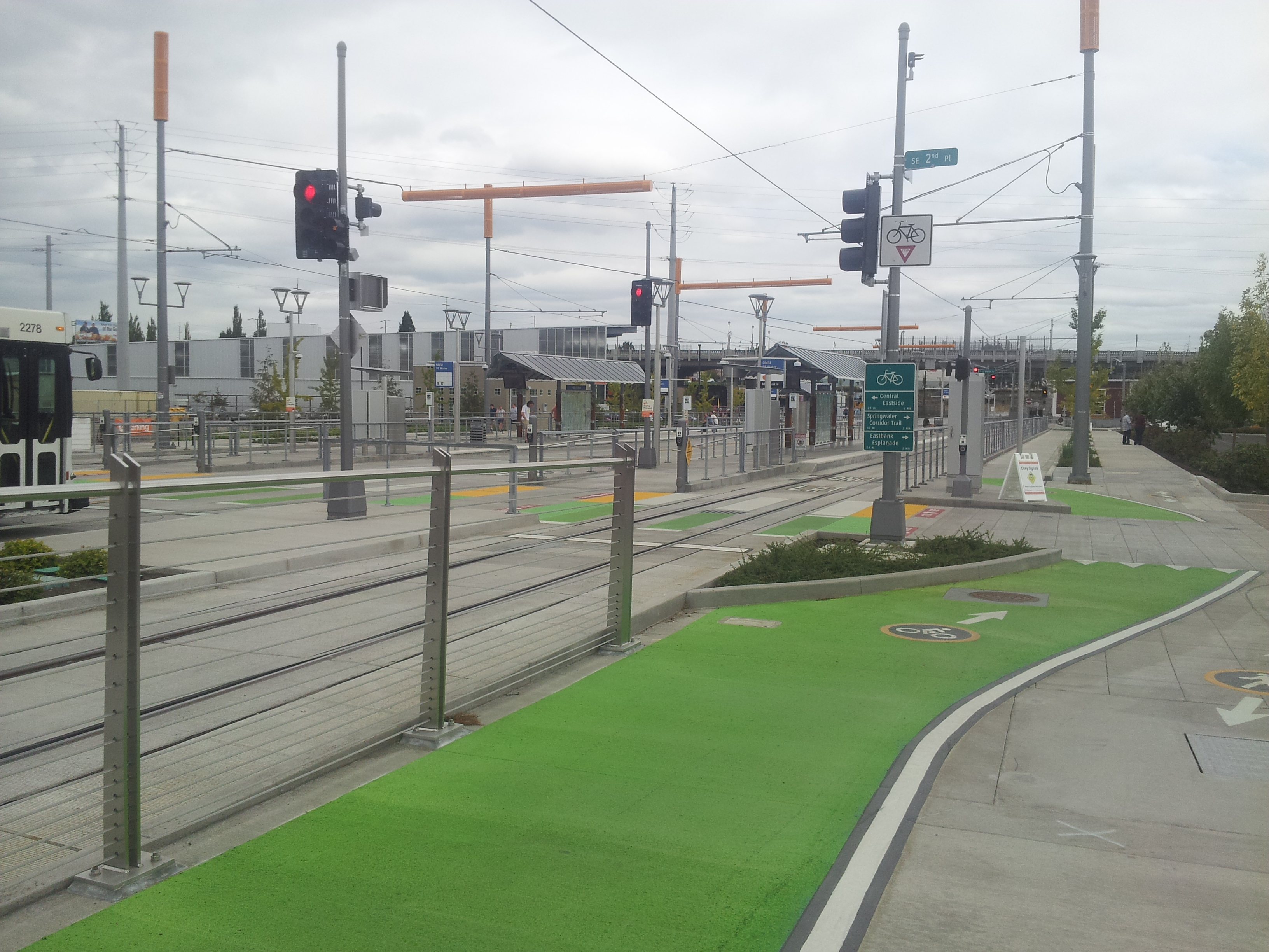 MAX Orange Line at OMSI, 2015